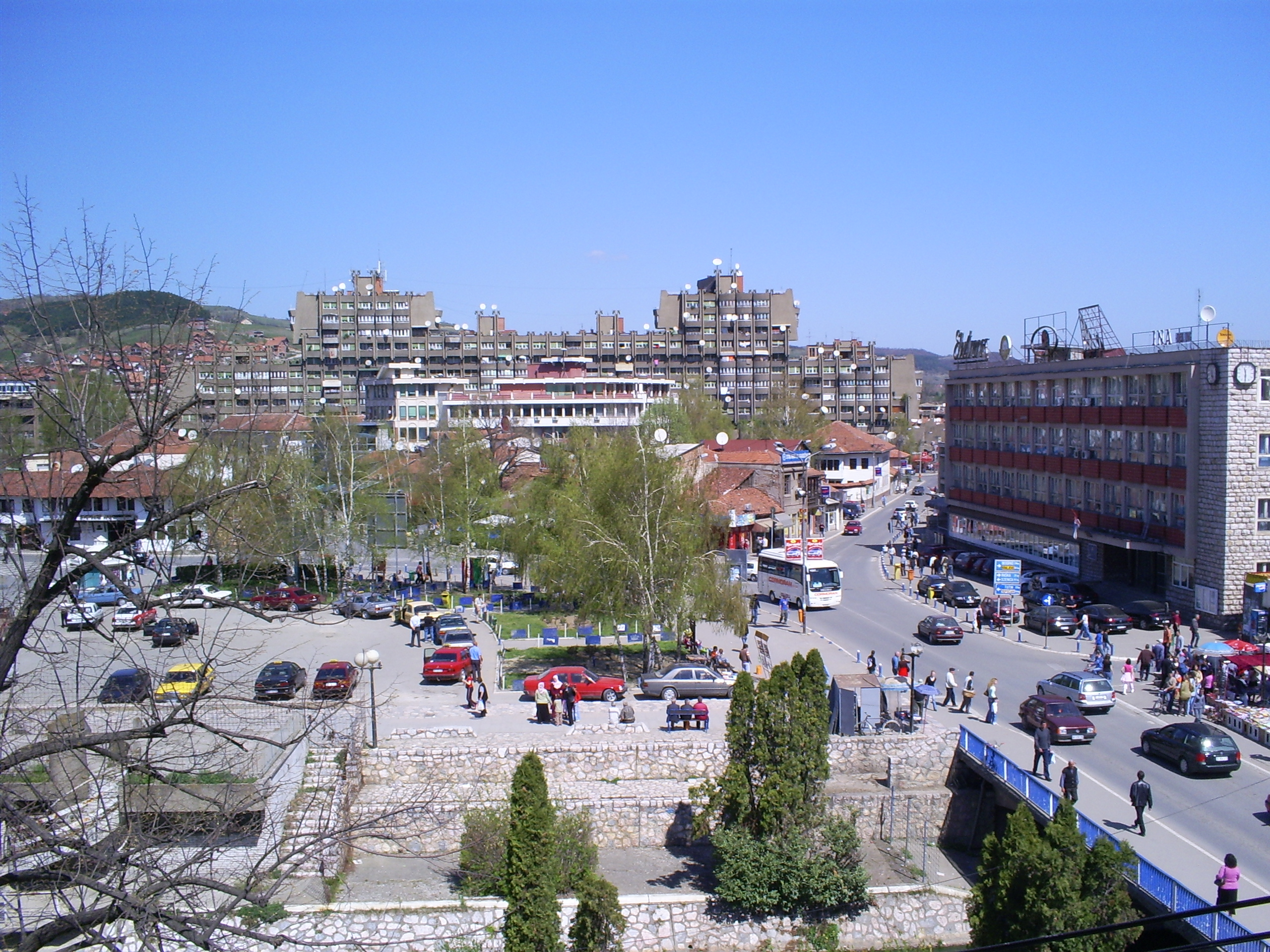 Pogled na Novi Pazar sa utvrdjenja u centru grada